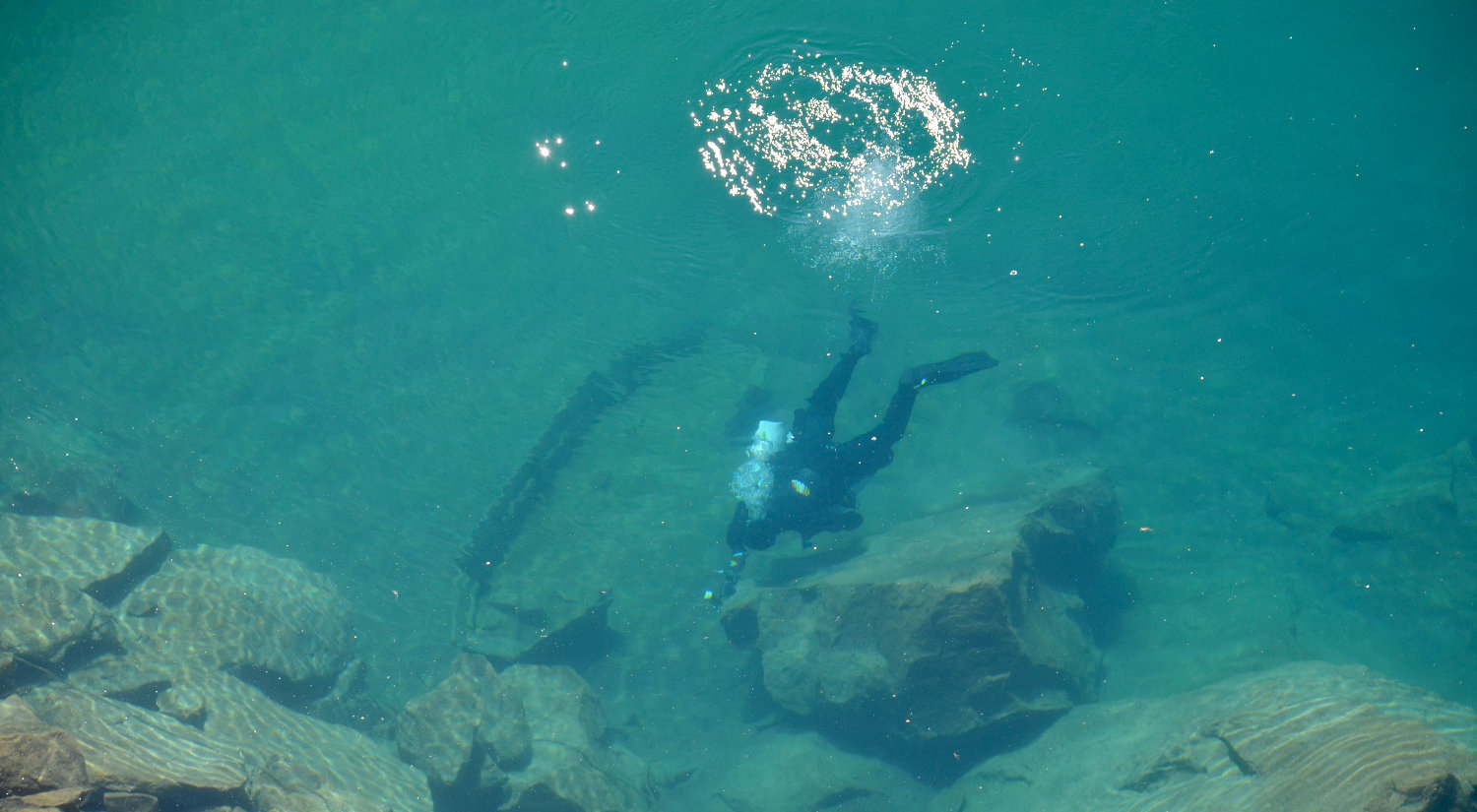 Foto scattata durante la missione di archeologia subacquea presso il Lago del Mandrone (2406 m. s.l.m.) per la documentazione 3D del relitto della barca costruita dagli Alpini del Battaglione Edolo, risalente alla Prima Guerra Mondiale (archivio fotografico Arc-Team).